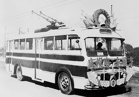 中文（中国大陆）: 1961年4月26日，1路改为无轨电车线路。